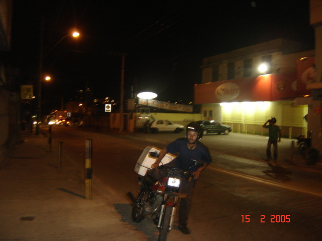 Fotografia amadora feita em 2005, onde se vê a Rua Gustavo da Silveira.